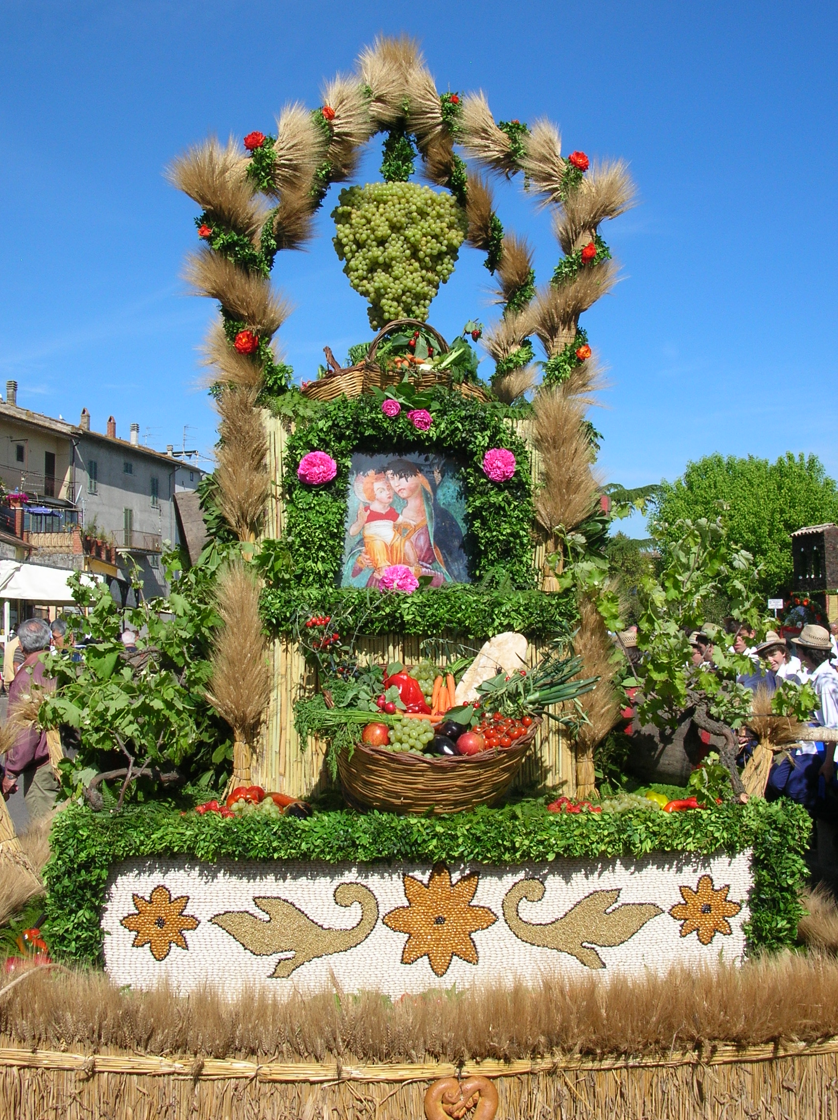 Fontana Villani - Marta, Italy